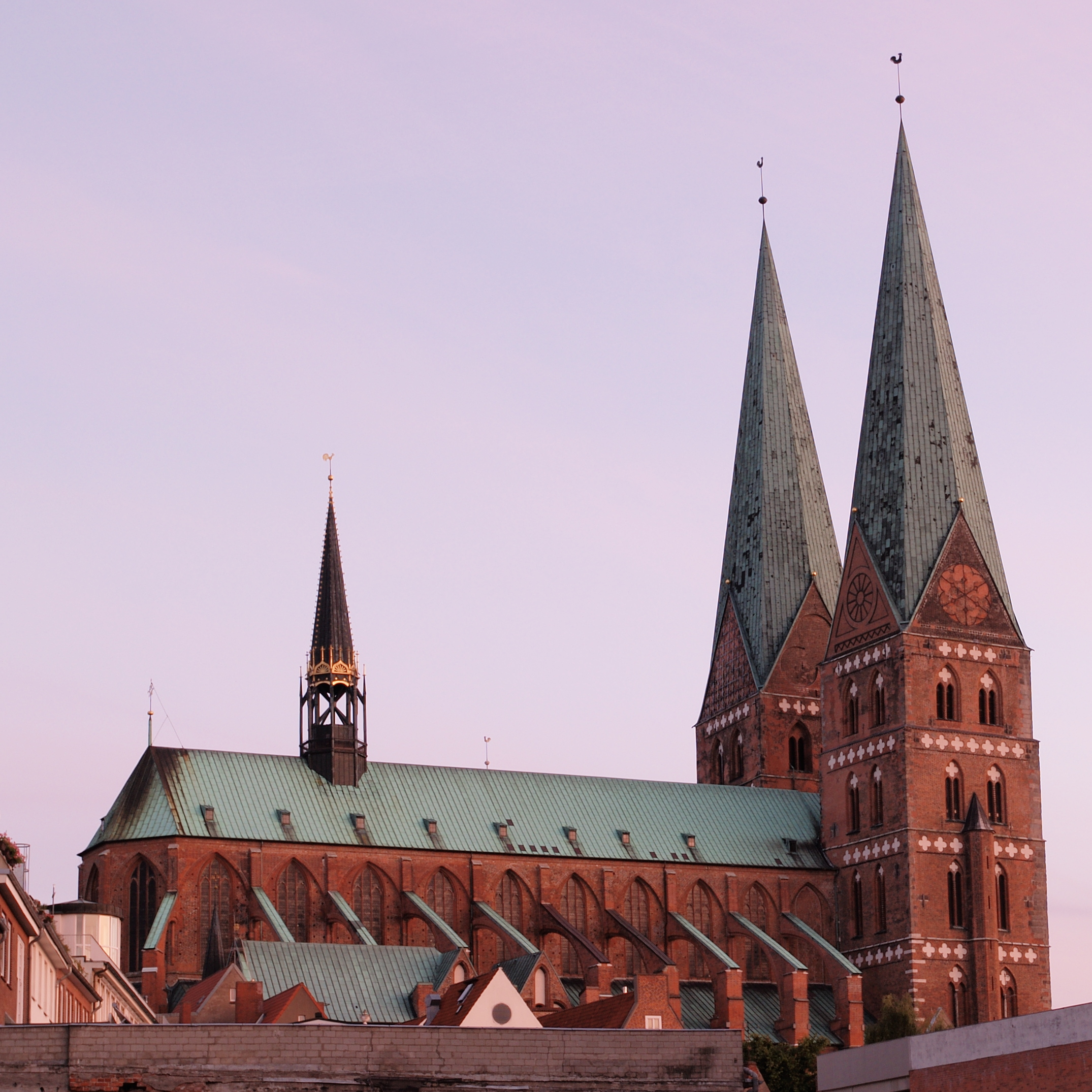 Ansicht der St. Marien Kirche in Lübeck, von Norden her